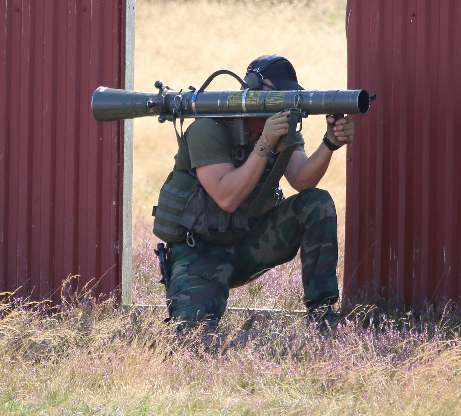 Granatgevär m/48 Revinge 2015